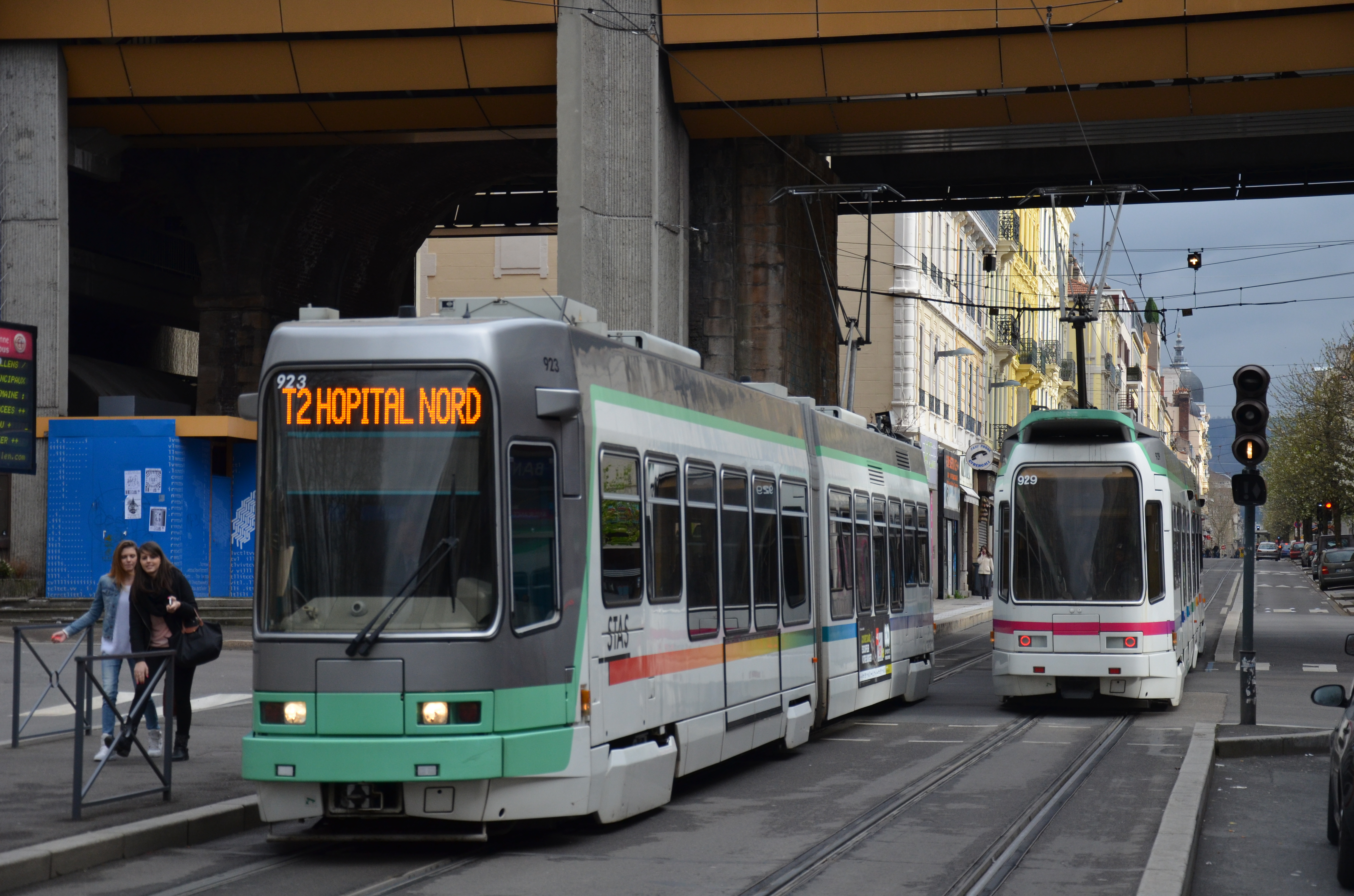 Alsthom Vevey Düwag n°923 et 929 sur la ligne T2 du réseau STAS de Saint-Étienne, à Place Carnot.